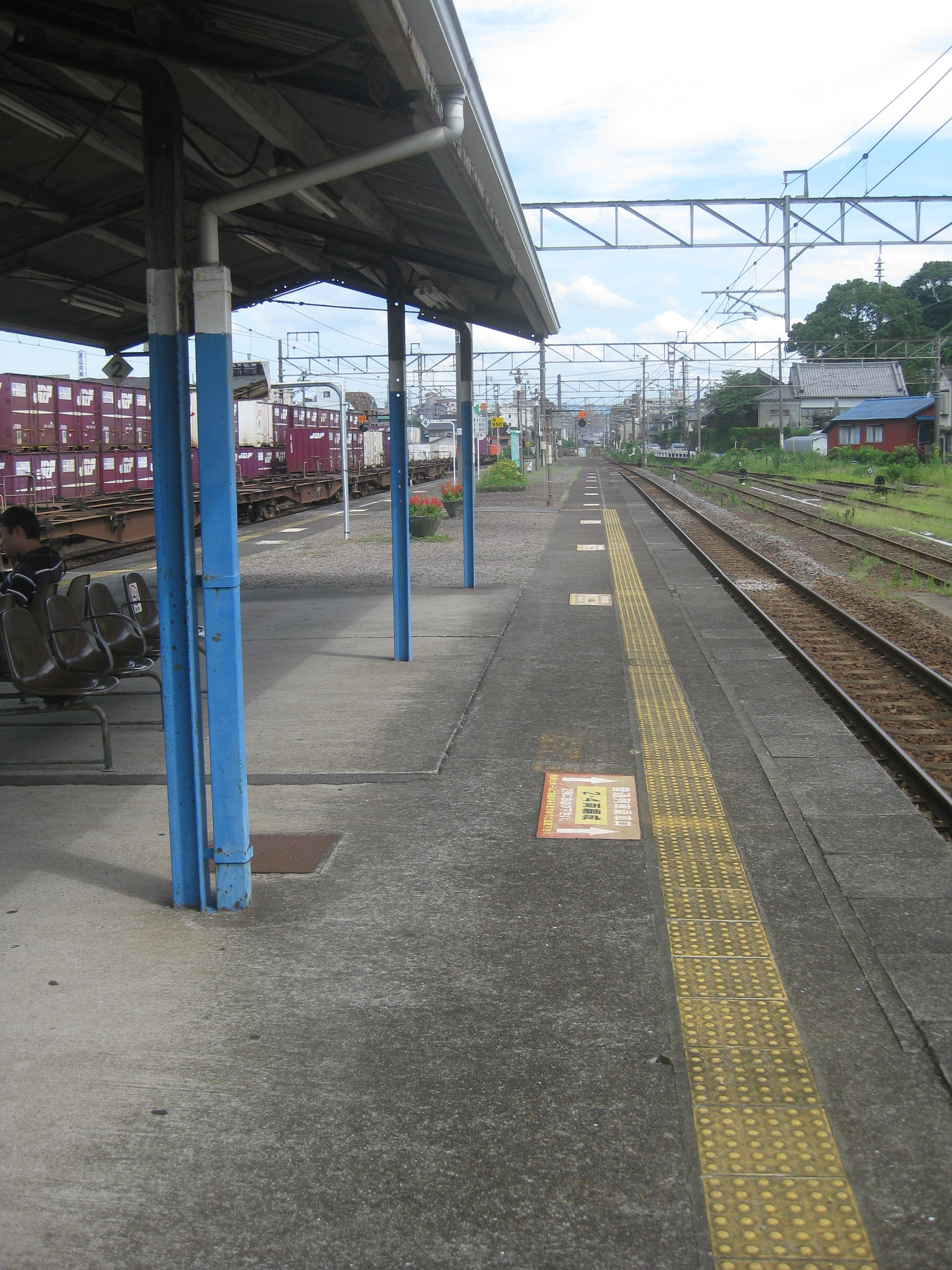 西大分駅のホームの、大分方面の様子です。